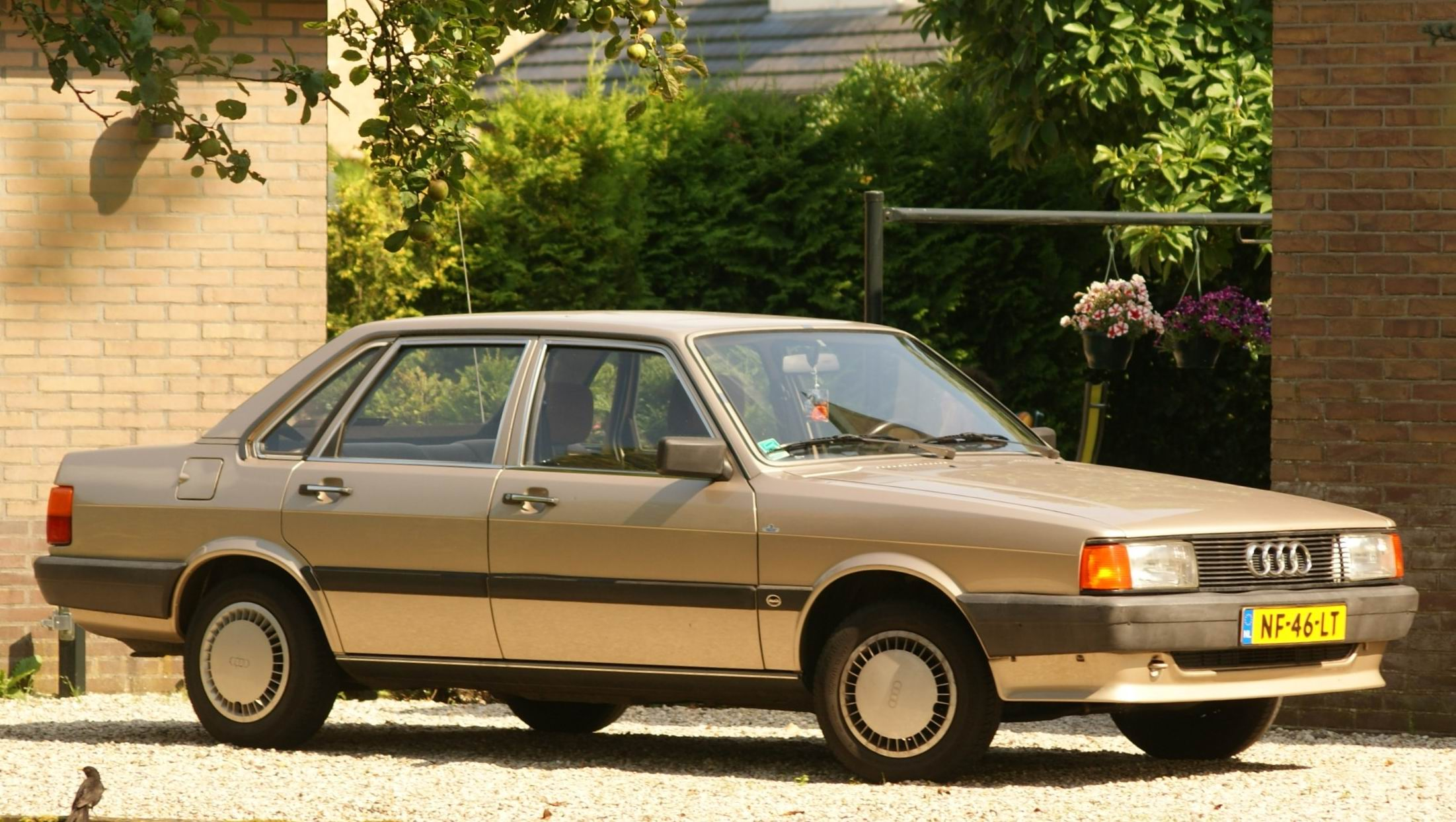 NF-46-LT